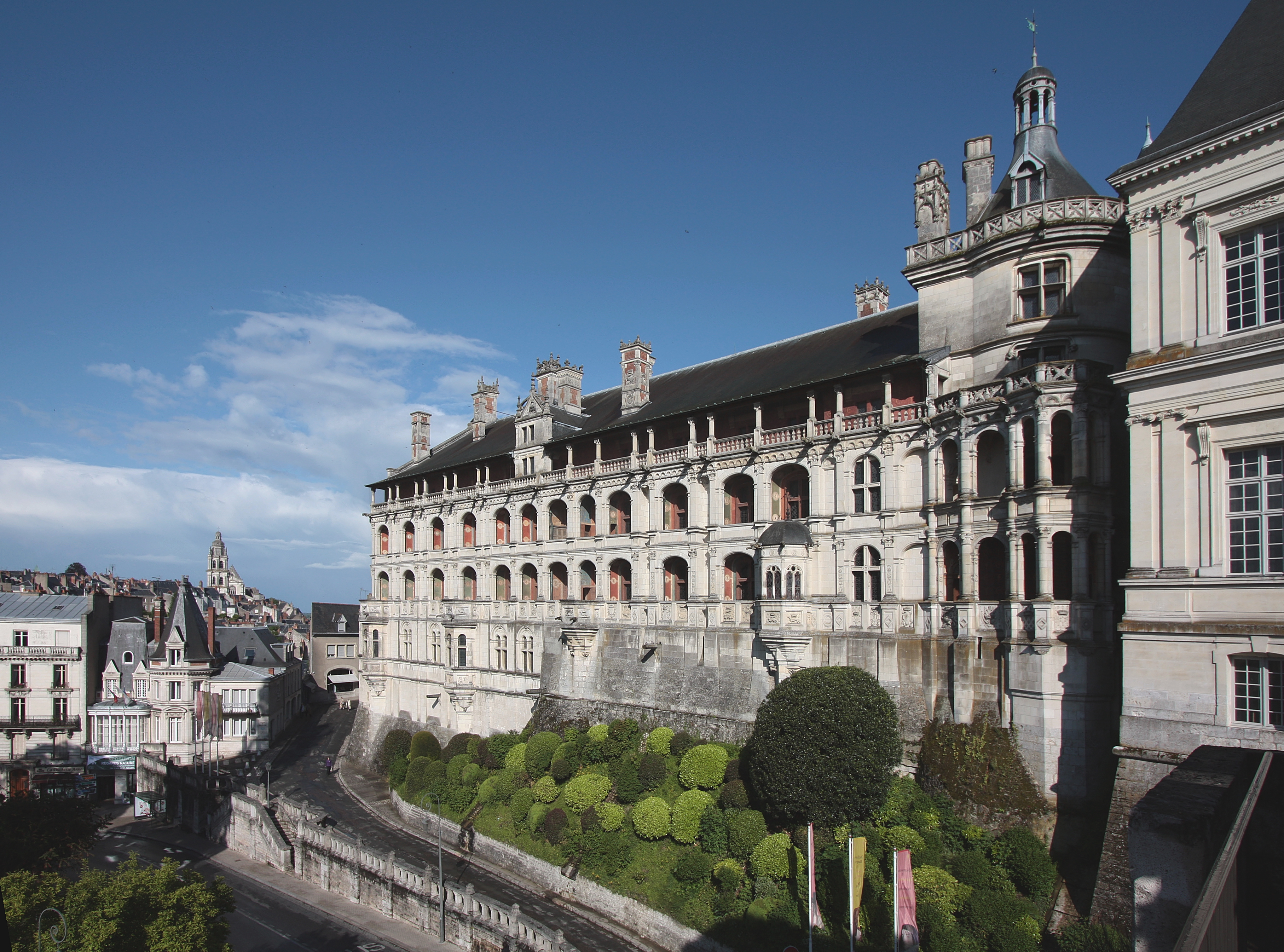 Schloss und Stadt Blois, Departement Loir-et-Cher/Frankreich - Loggienfassade (Flügel Franz I.) mit Stadt und Turm der Kathedrale Saint-Louis im Hintergrund.